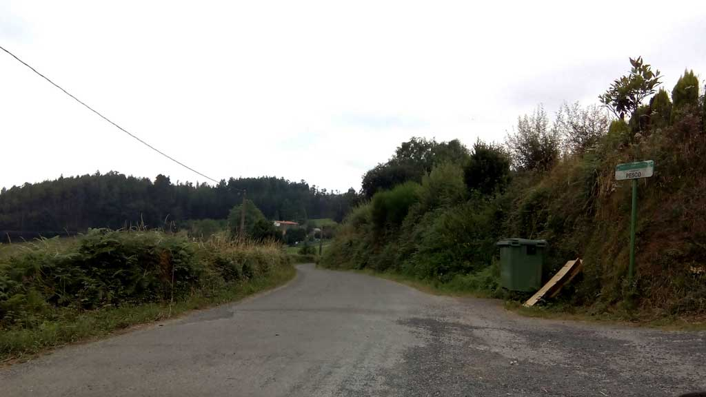 Acceso a Pesco, Oza dos Ríos.